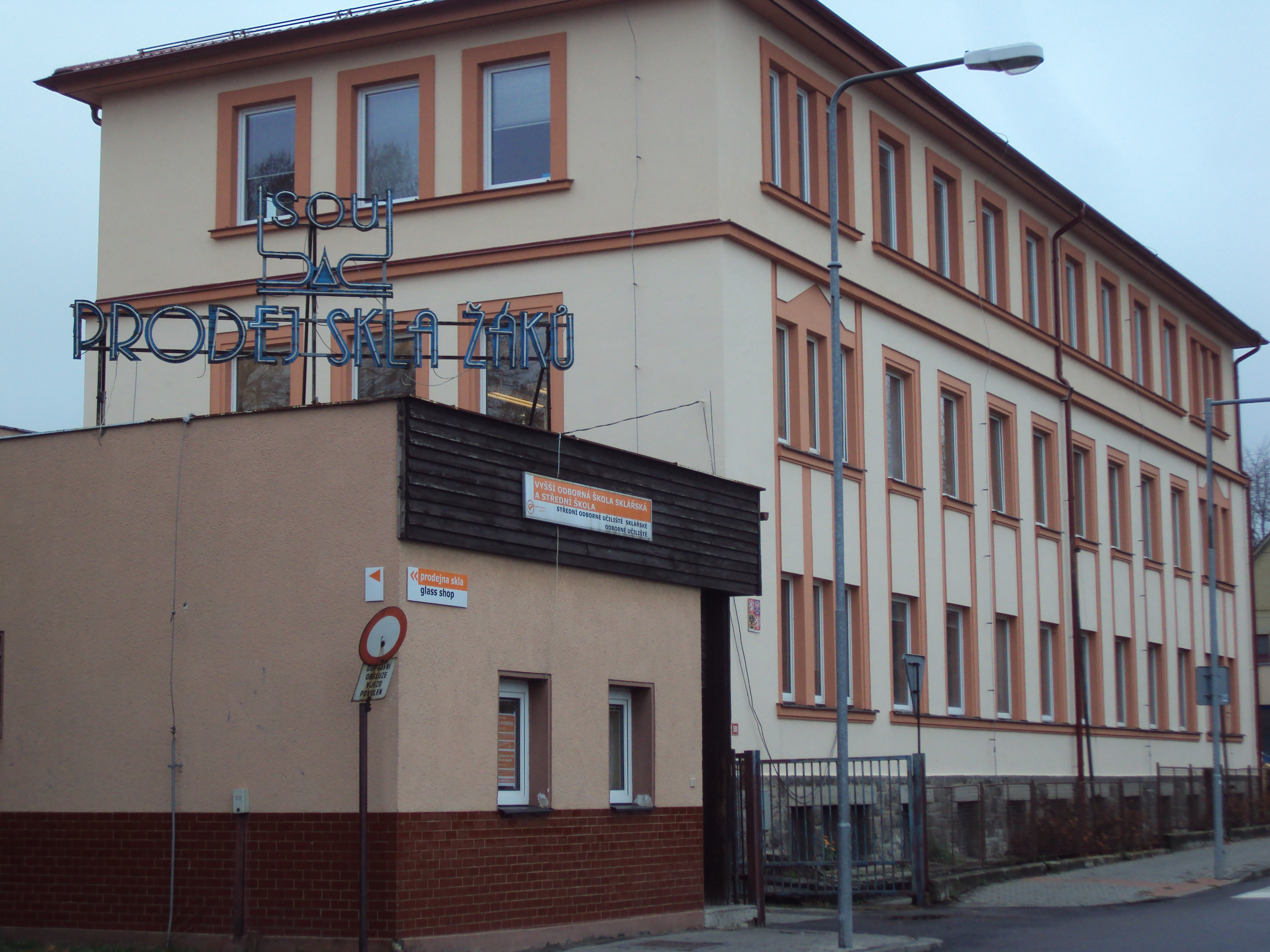 Sklářská škola v Novém Boru, vedle divadla a bus nádraží